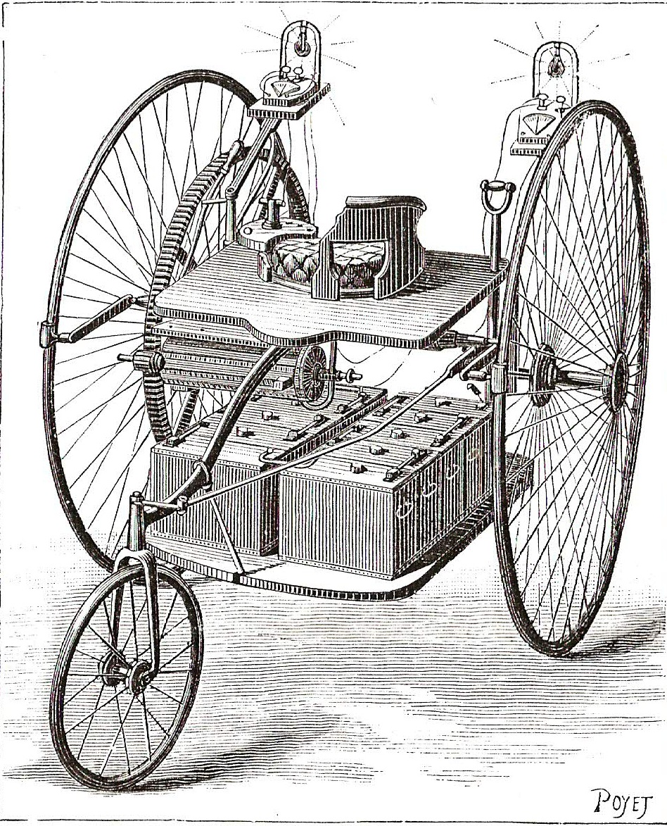 Elektrodreirad